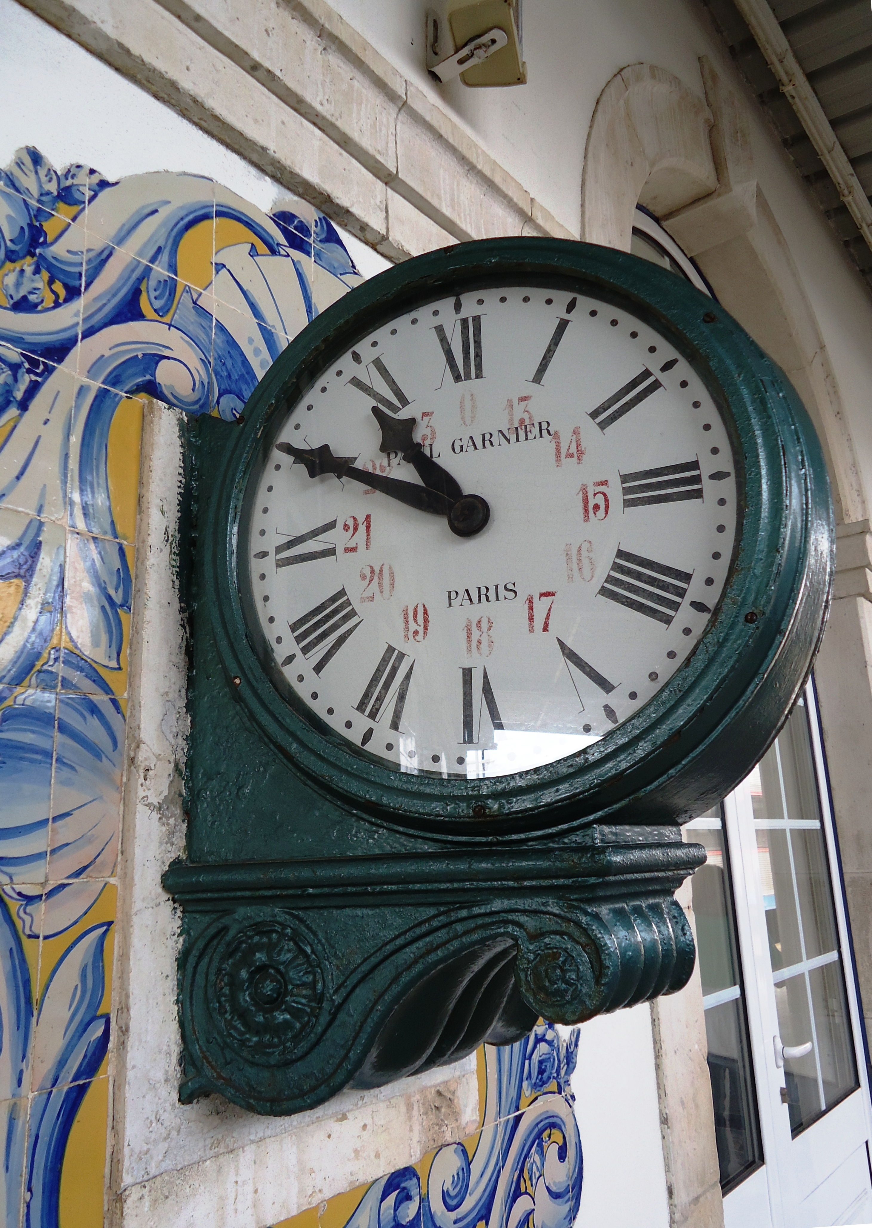 Relógio Paul Garnier (Paris) na estação de caminhos de ferro de Caldas da Rainha, distrito de Leiria, Portugal.